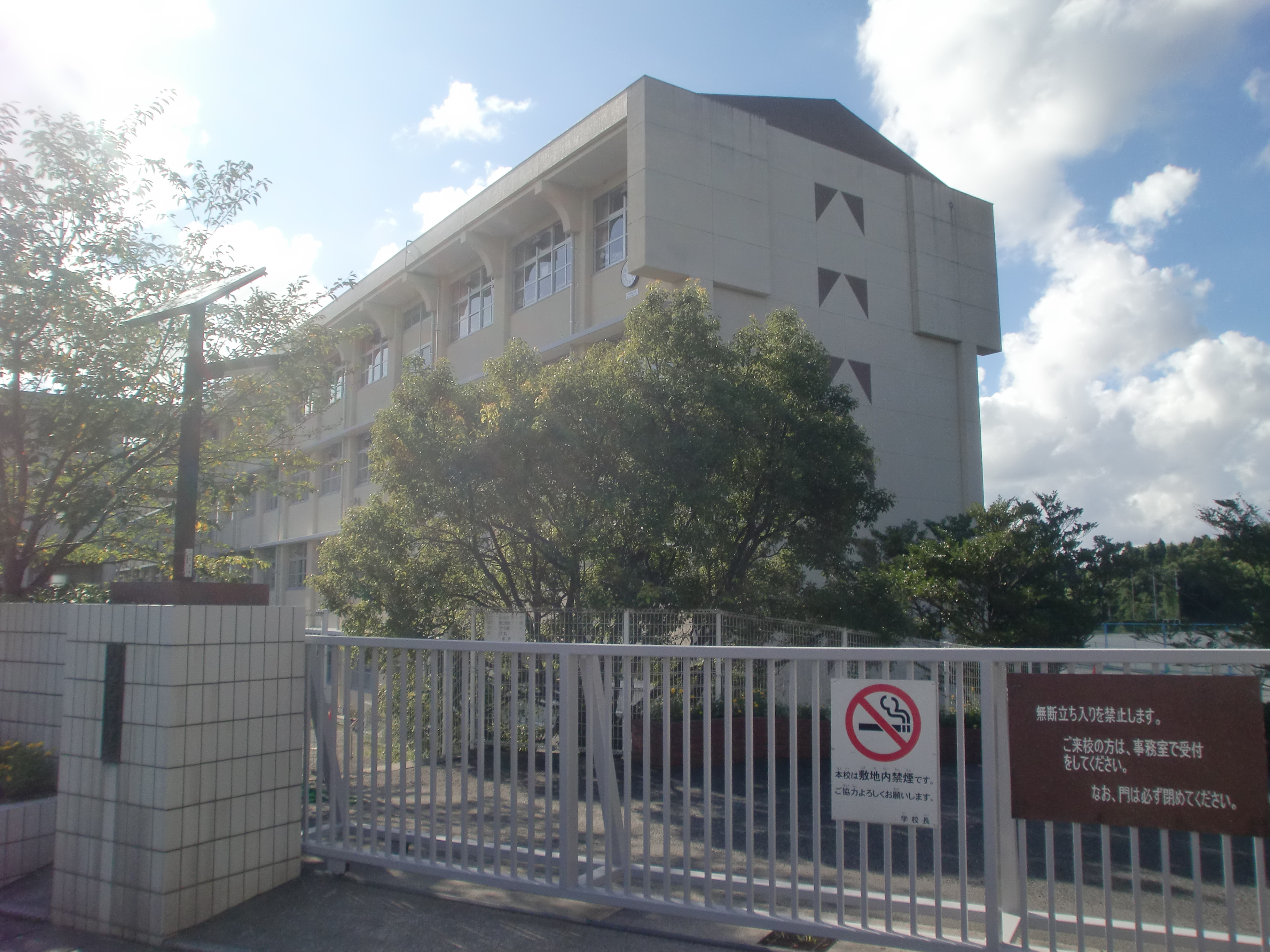 鹿児島市立武岡中学校の外観。